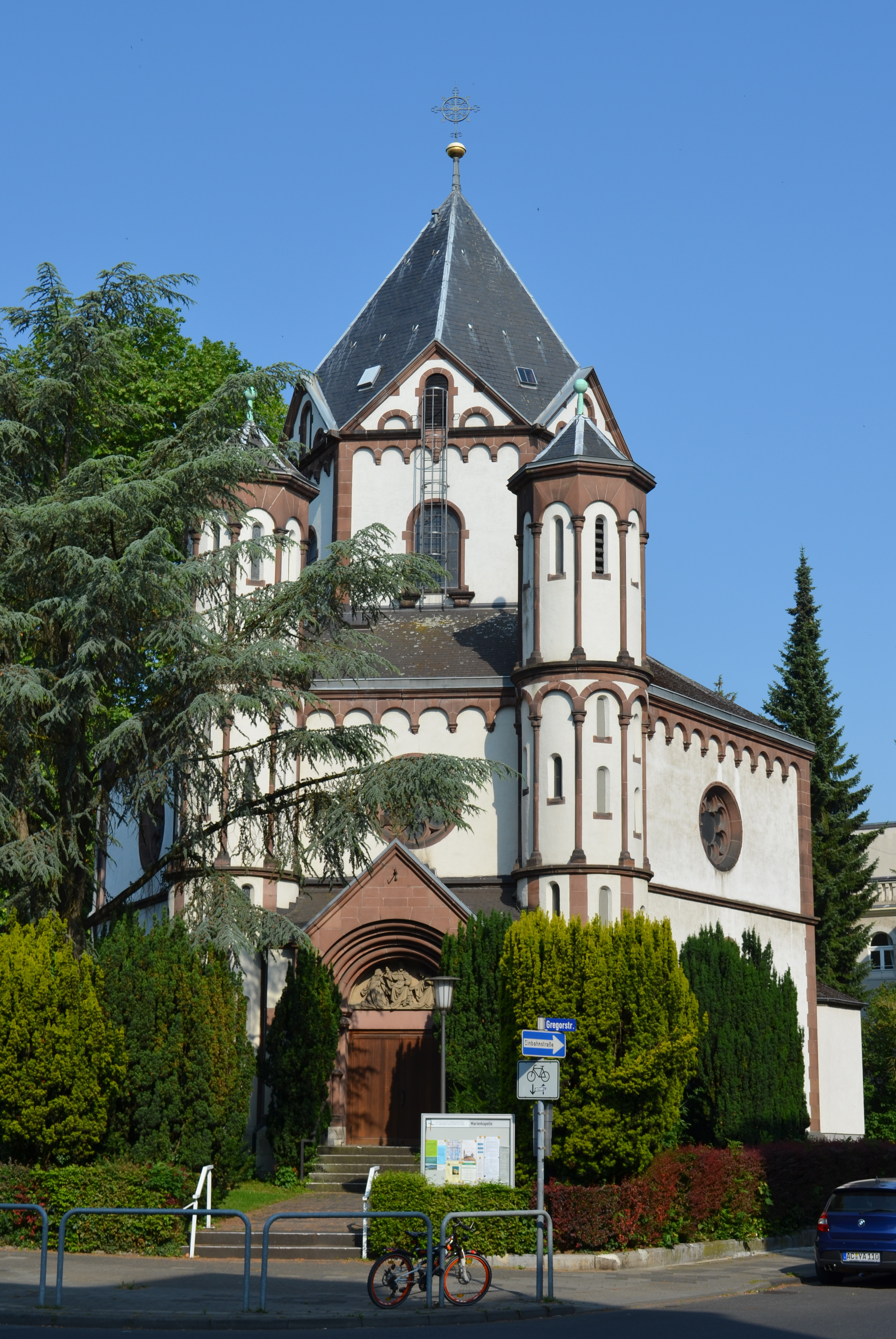 Die Marienkapelle in Aachen-Burtscheid, Ansicht von Südosten